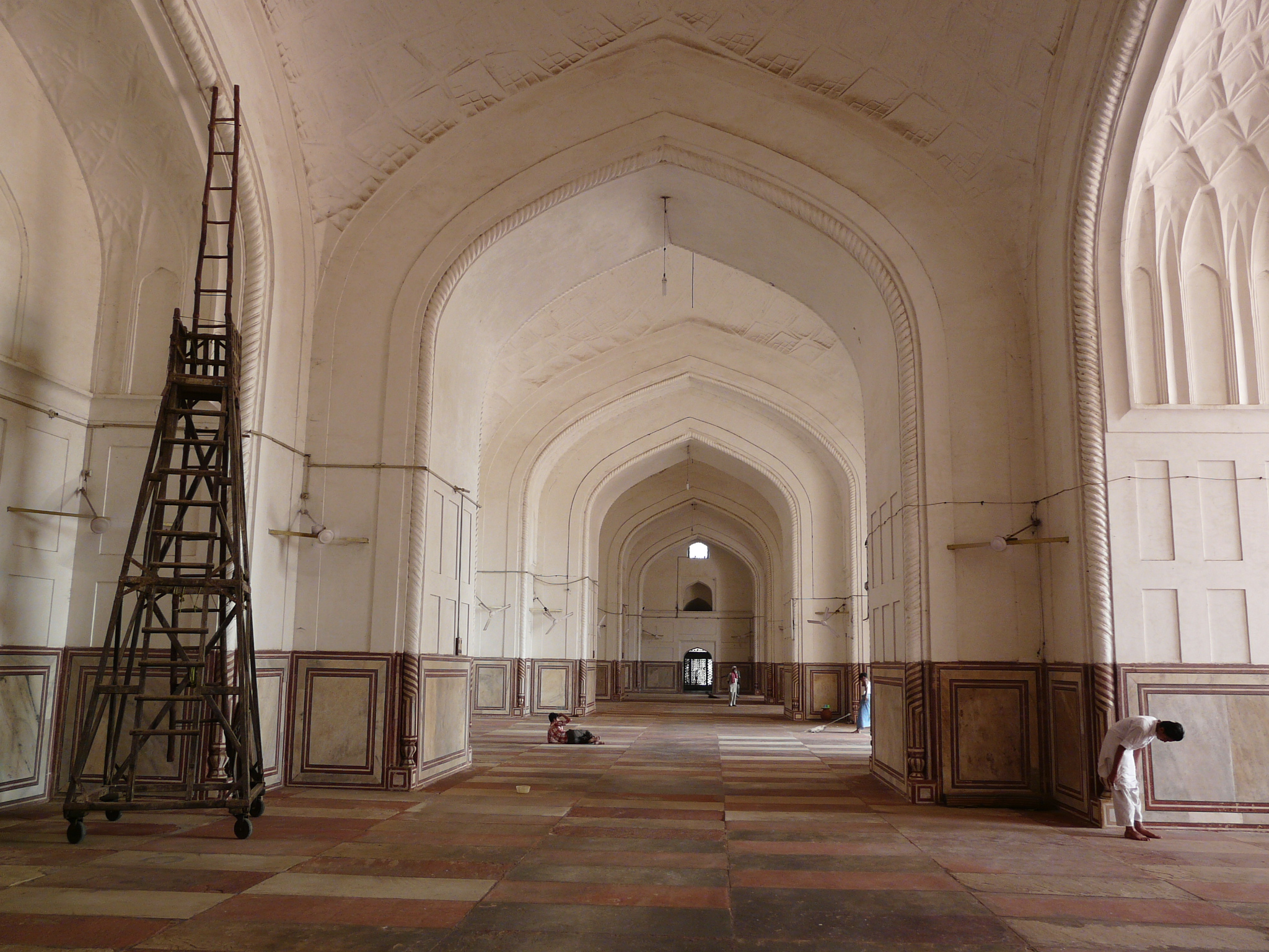 Agra Jama Masjid Jama Masjid, Agra, India